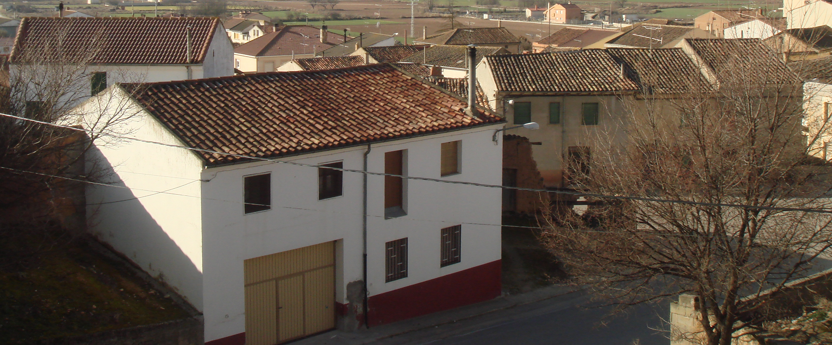 Villalba de Duero, Ribera del Duero, Burgos, Spain, edificaciones populares